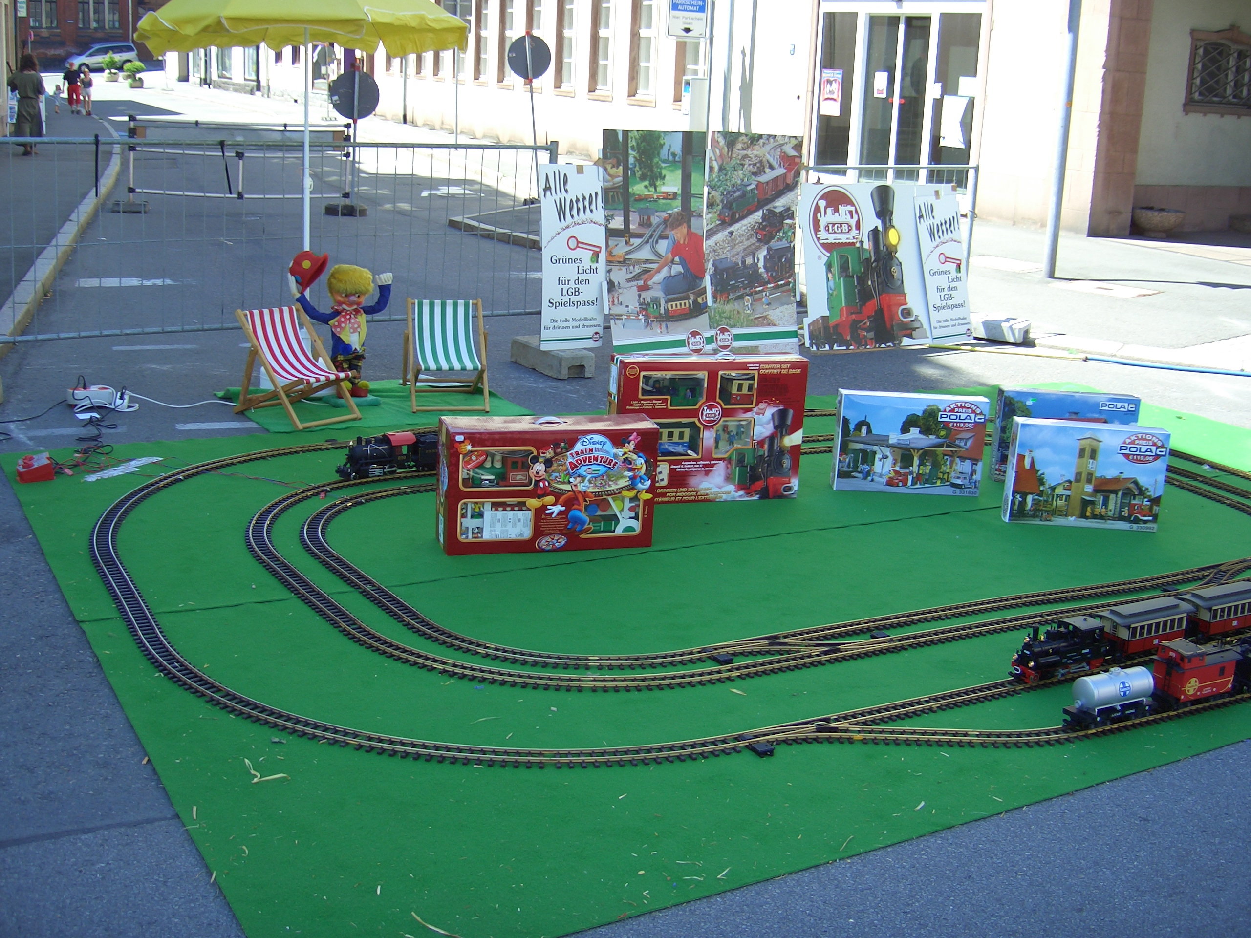 Stadtfest Aue, 2006 / Eisenbahn vorm "Schieck"